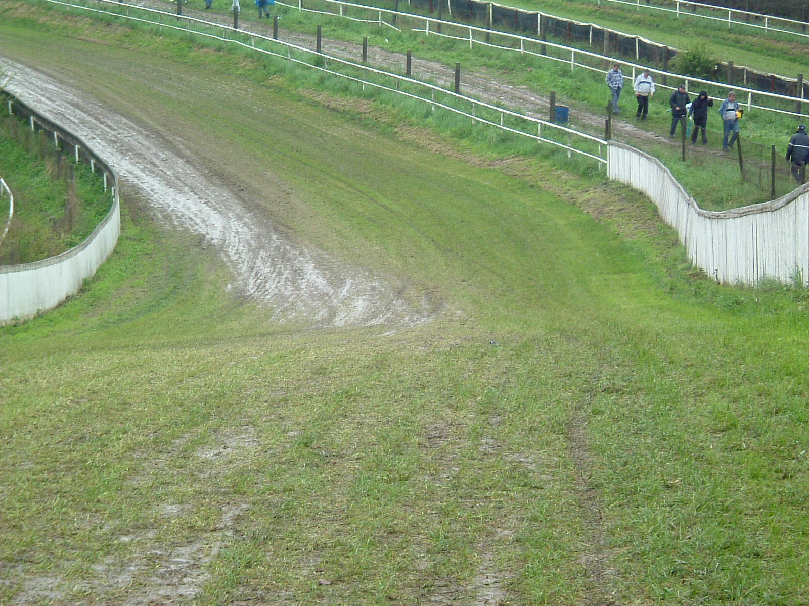 Eingang zur Nordkurve auf dem Teterower Bergring